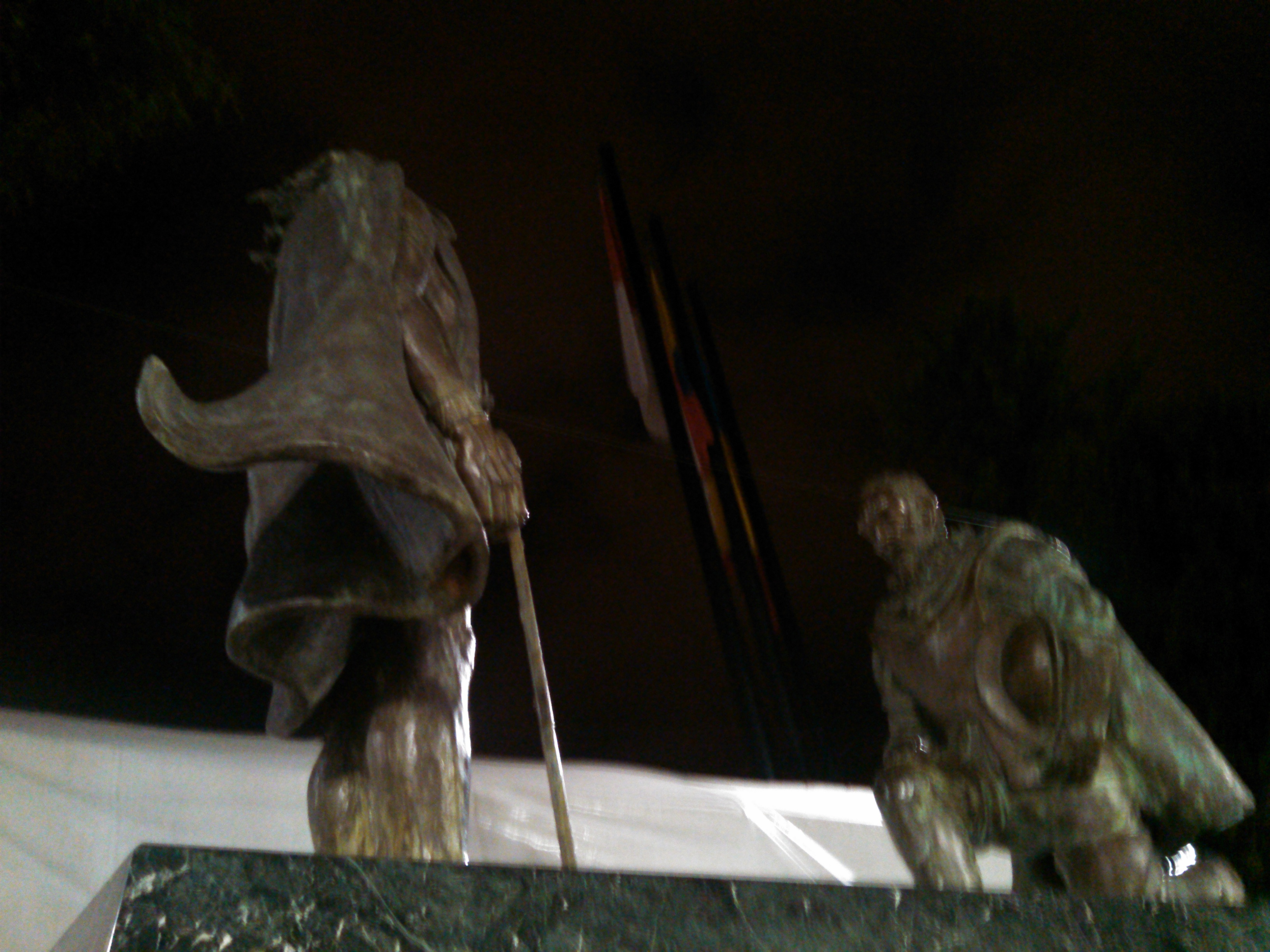 (+1539) Quinto y ultimo Zipa de Bacatá. hermano del anterior Zipa, Tisquesusa. Reconocido y apoyado por su pueblo debido a su valor y fuerza en las confrontaciones con los pueblos vecinos. Lidero a sus tropas en contra de los españoles, causandoles algunas pérdidas de importancia. Autor: Escultor, Juan Diego Guzman Tafur.